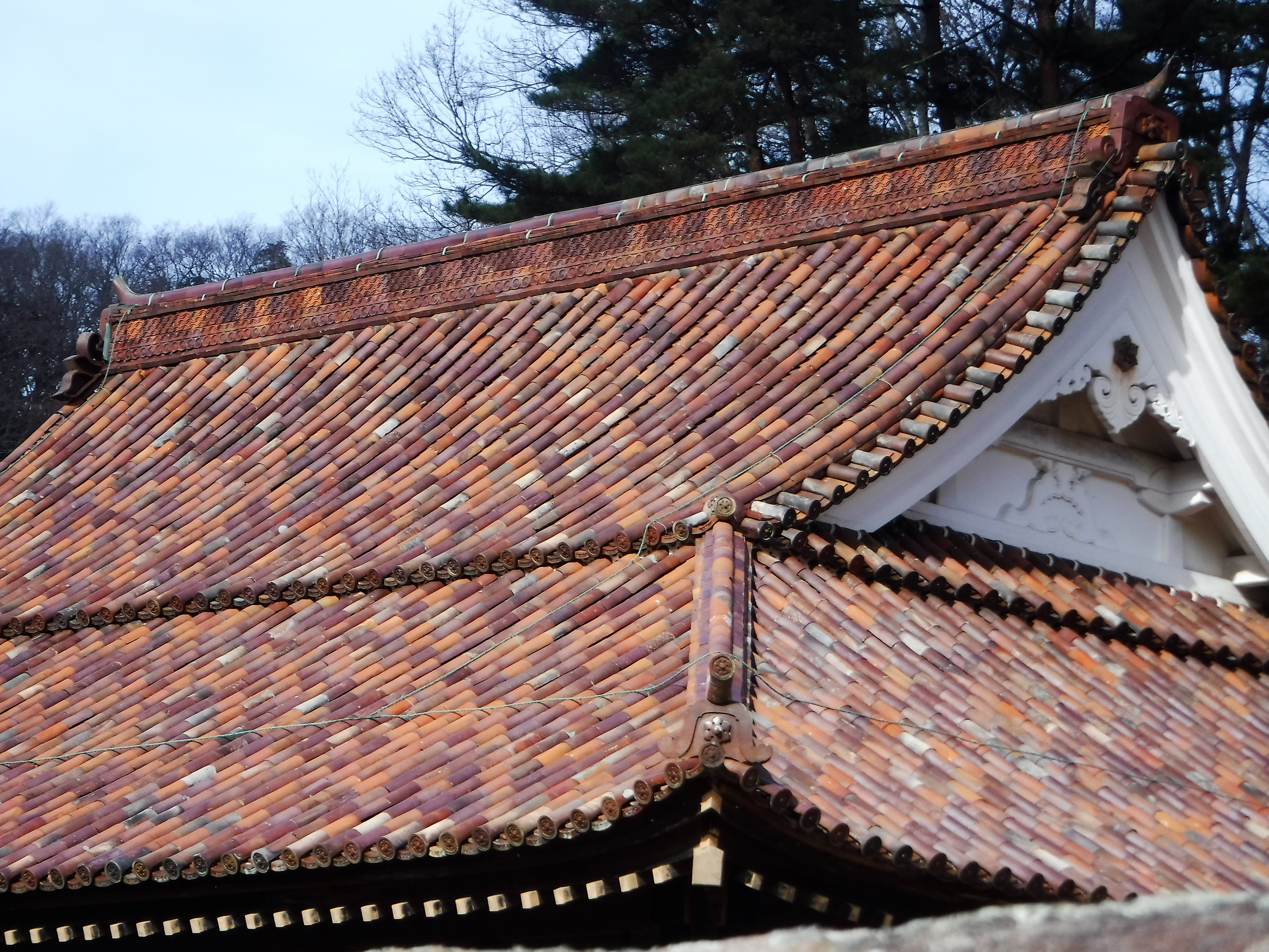 閑谷学校の講堂に使用されている窯変瓦